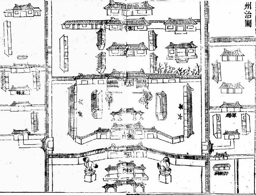 gudaizhouzhi